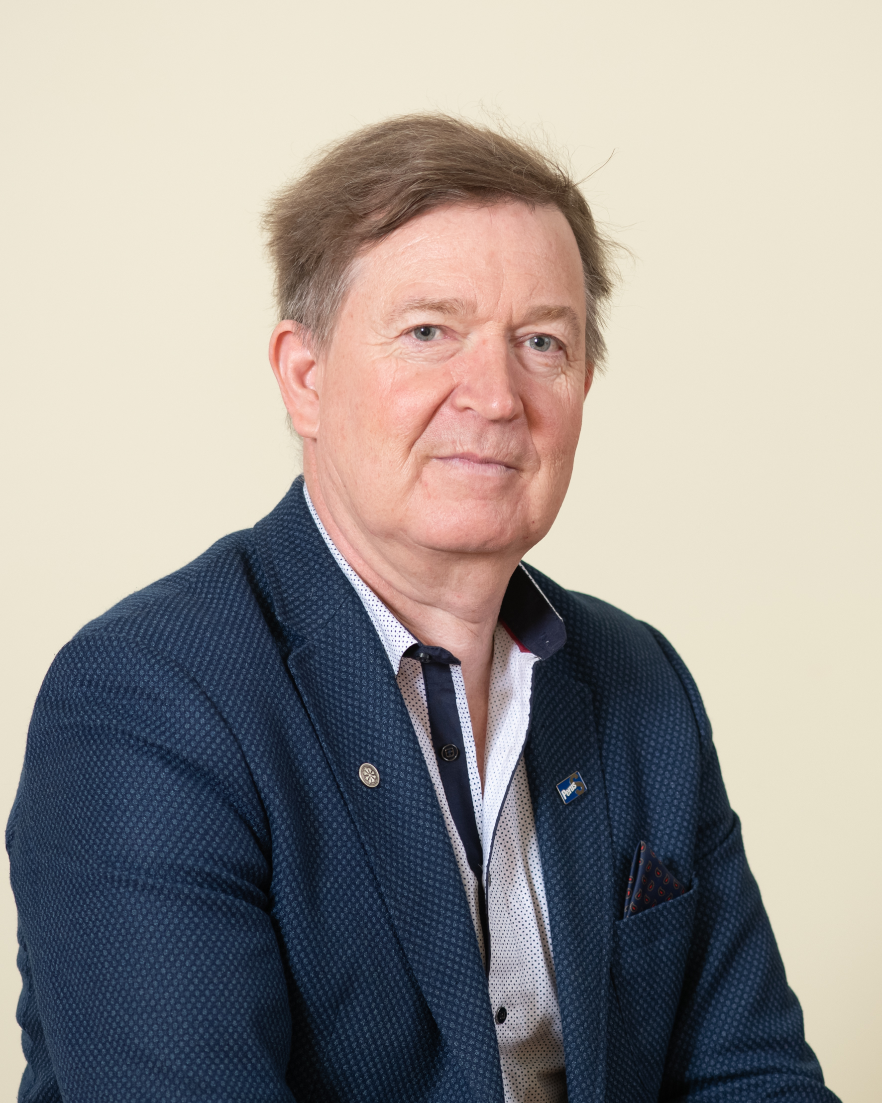 Urmas Espenberg